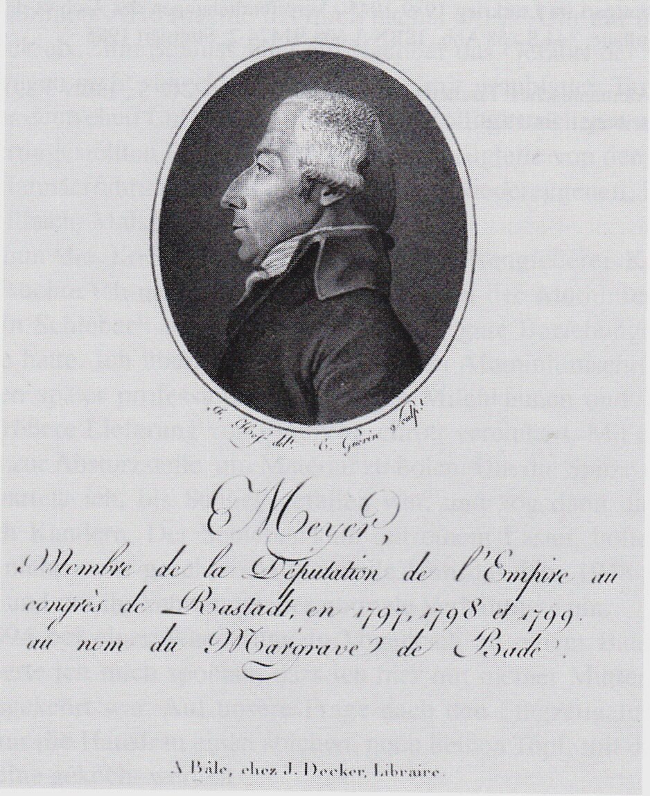 der badische Gesandte beim Rastatter Kongress, Emanuel Meier